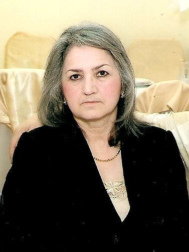 Rəfiqə İsmayılova